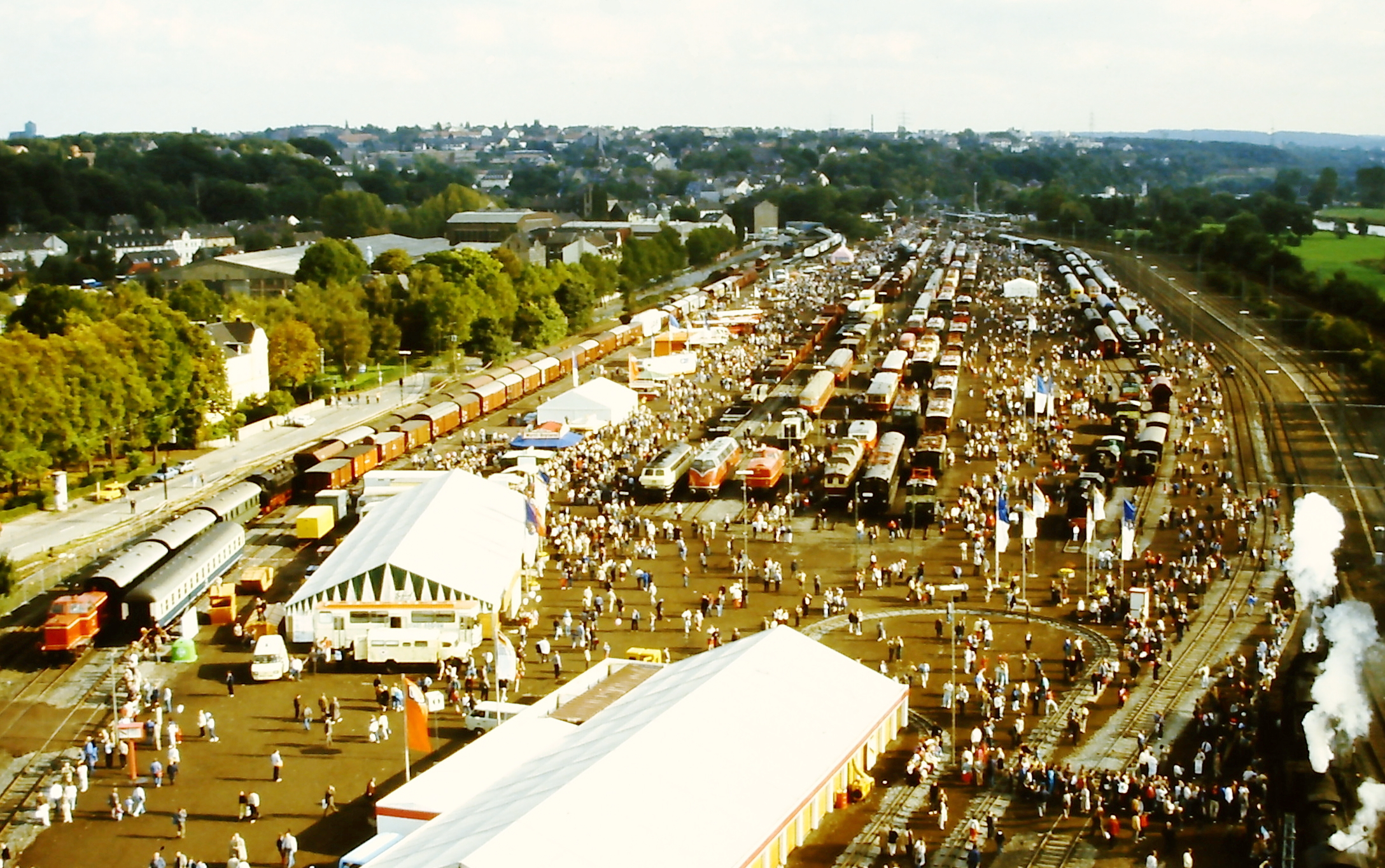 Fahrzeugschau 150 Jahre deutsche Eisenbahn - übrige Fahrzeuge